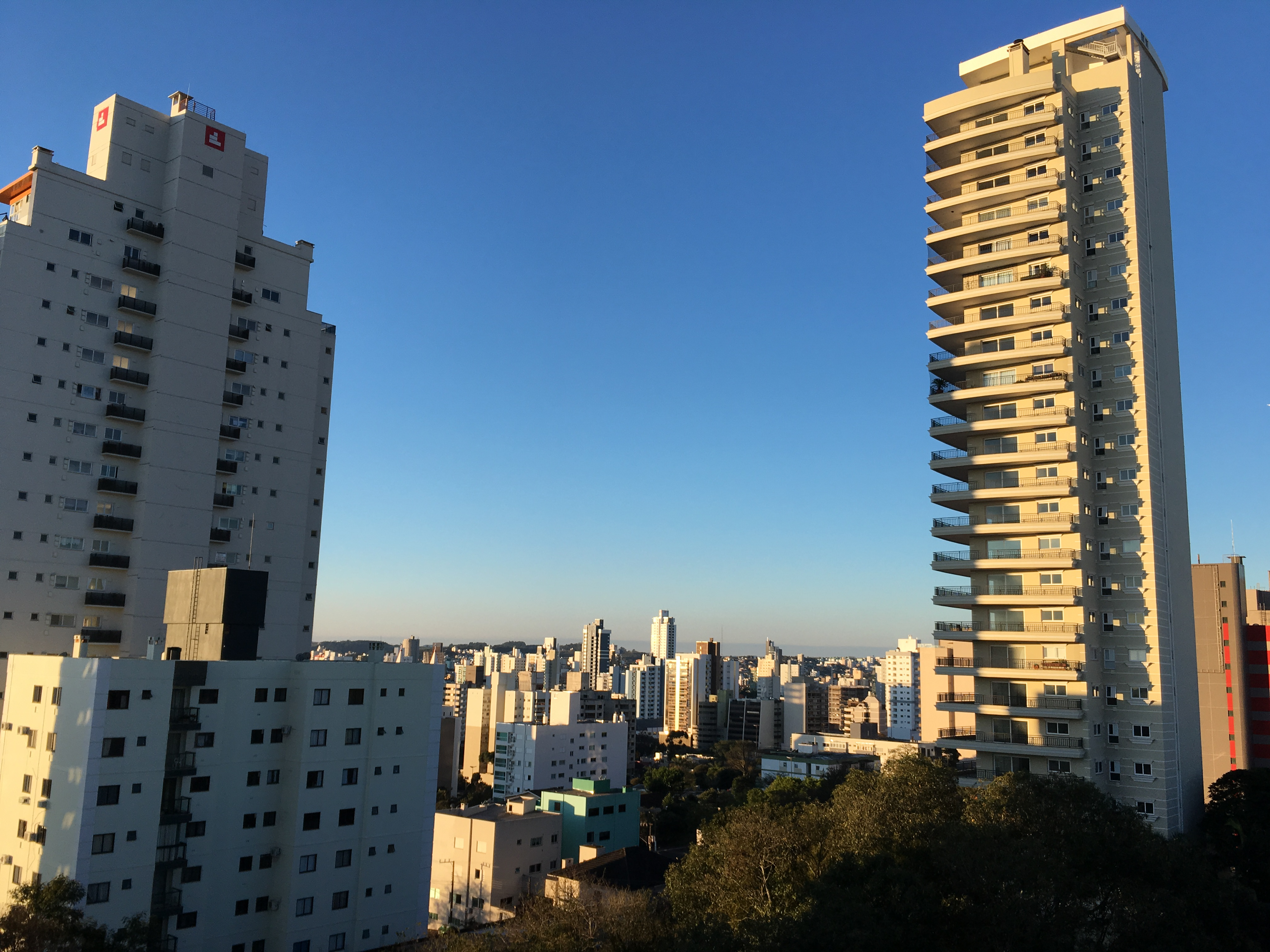 Vista parcial da região central